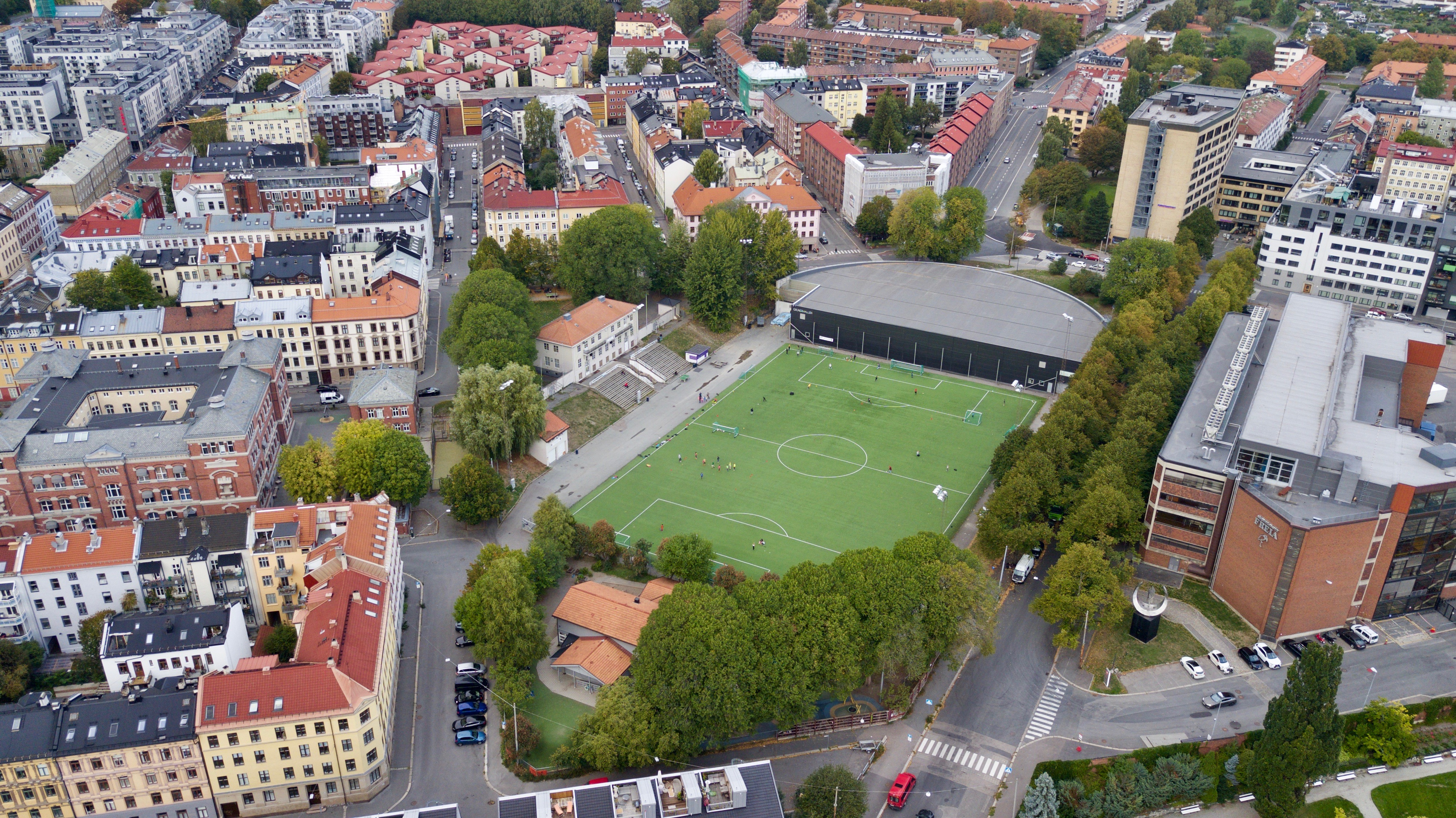 Dælenenga idrettsplass, Grünerhallen. Grünerløkka i Oslo.